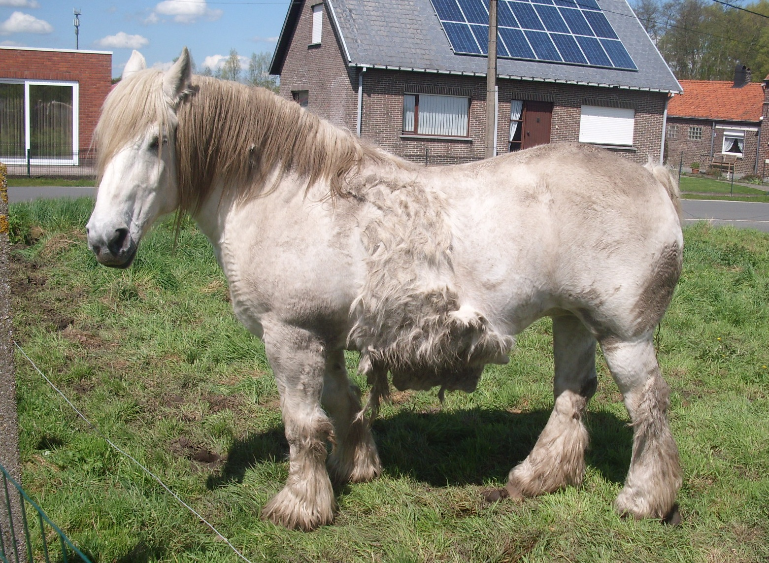 Paard verliest zijn wintervacht - lente 2012 - België